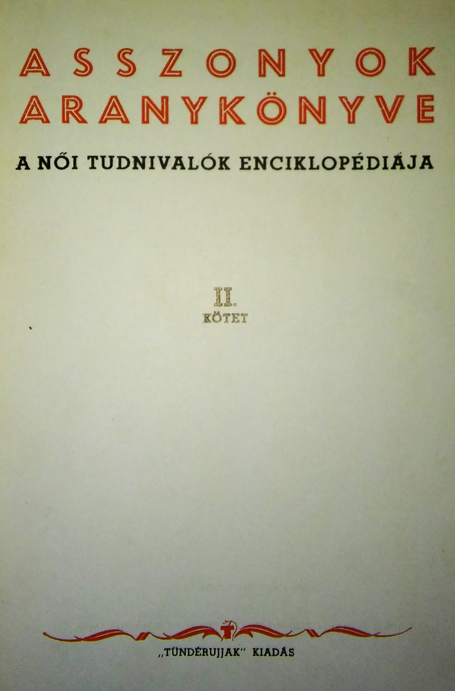 Asszonyok aranykönyve - a női tudnivalók enciklopédiája című könyv címlapja, Budapest, 1930-as évek